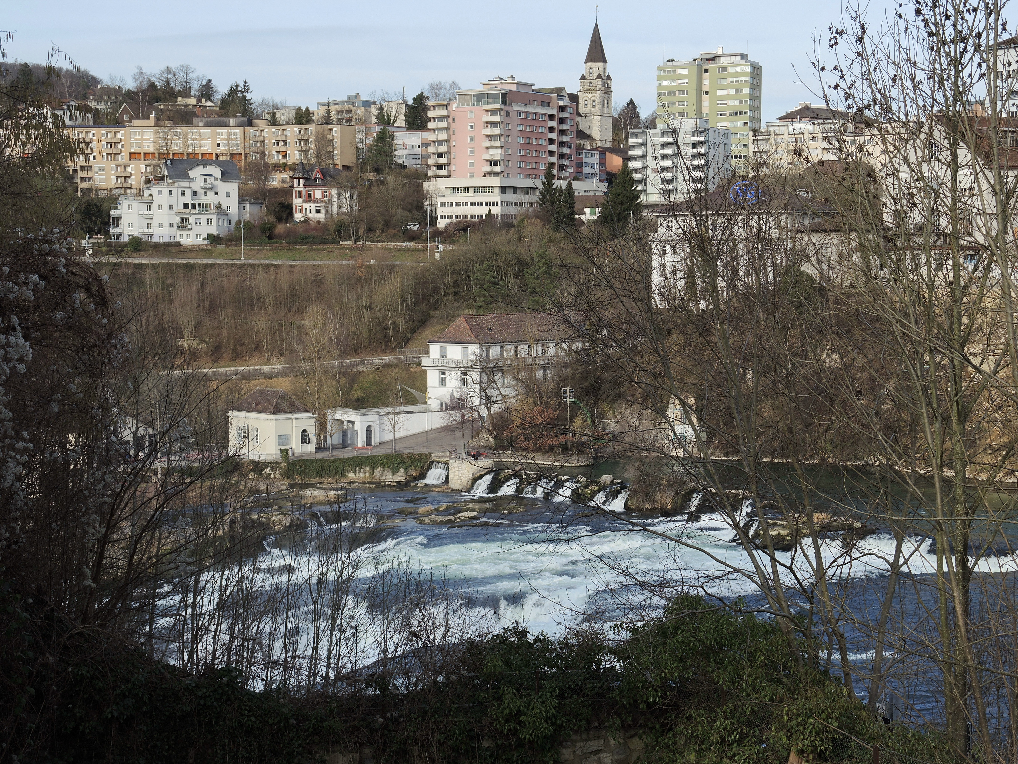 Rheinfall, Neuhausen am Rheinfall (Switzerland)